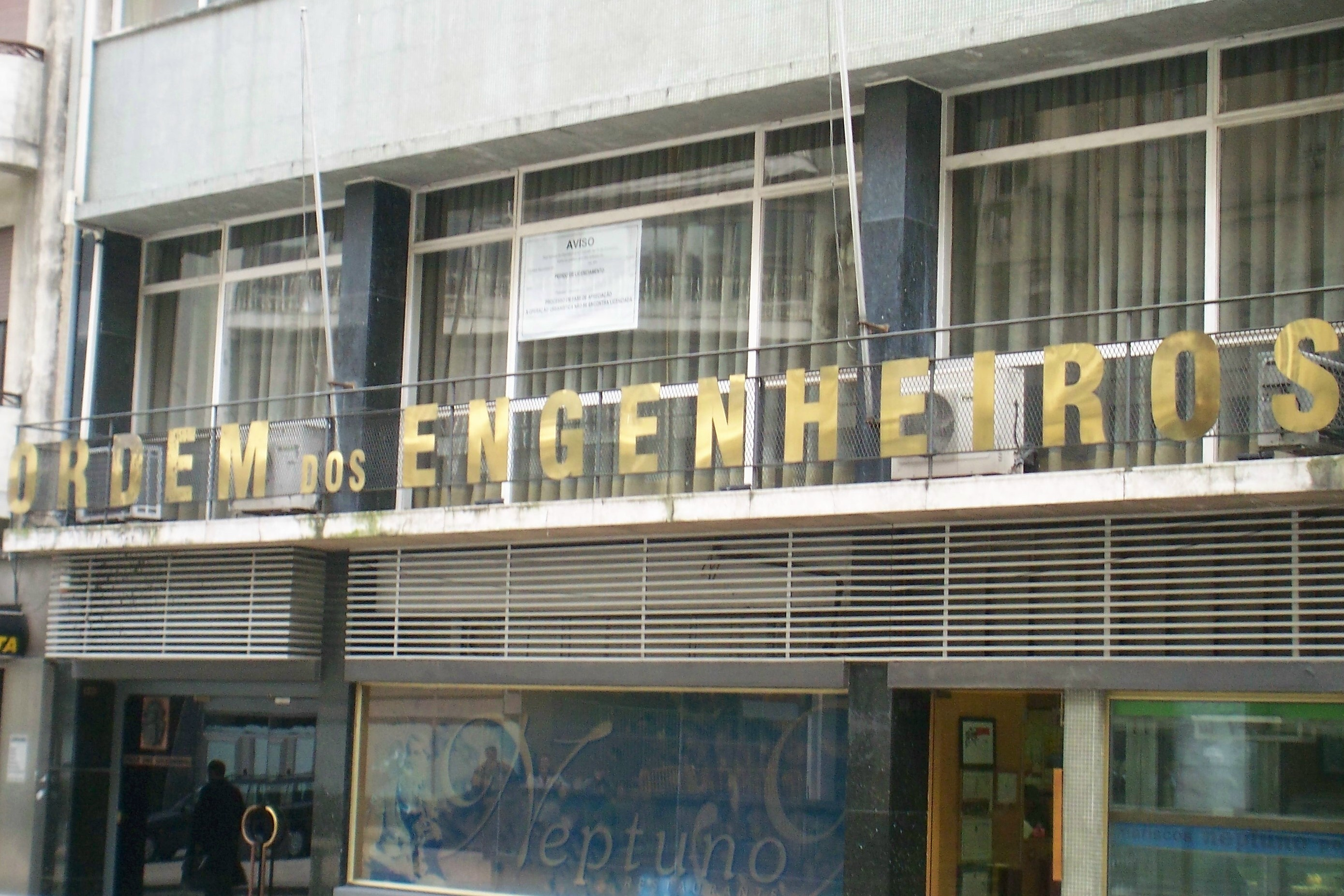 Porto